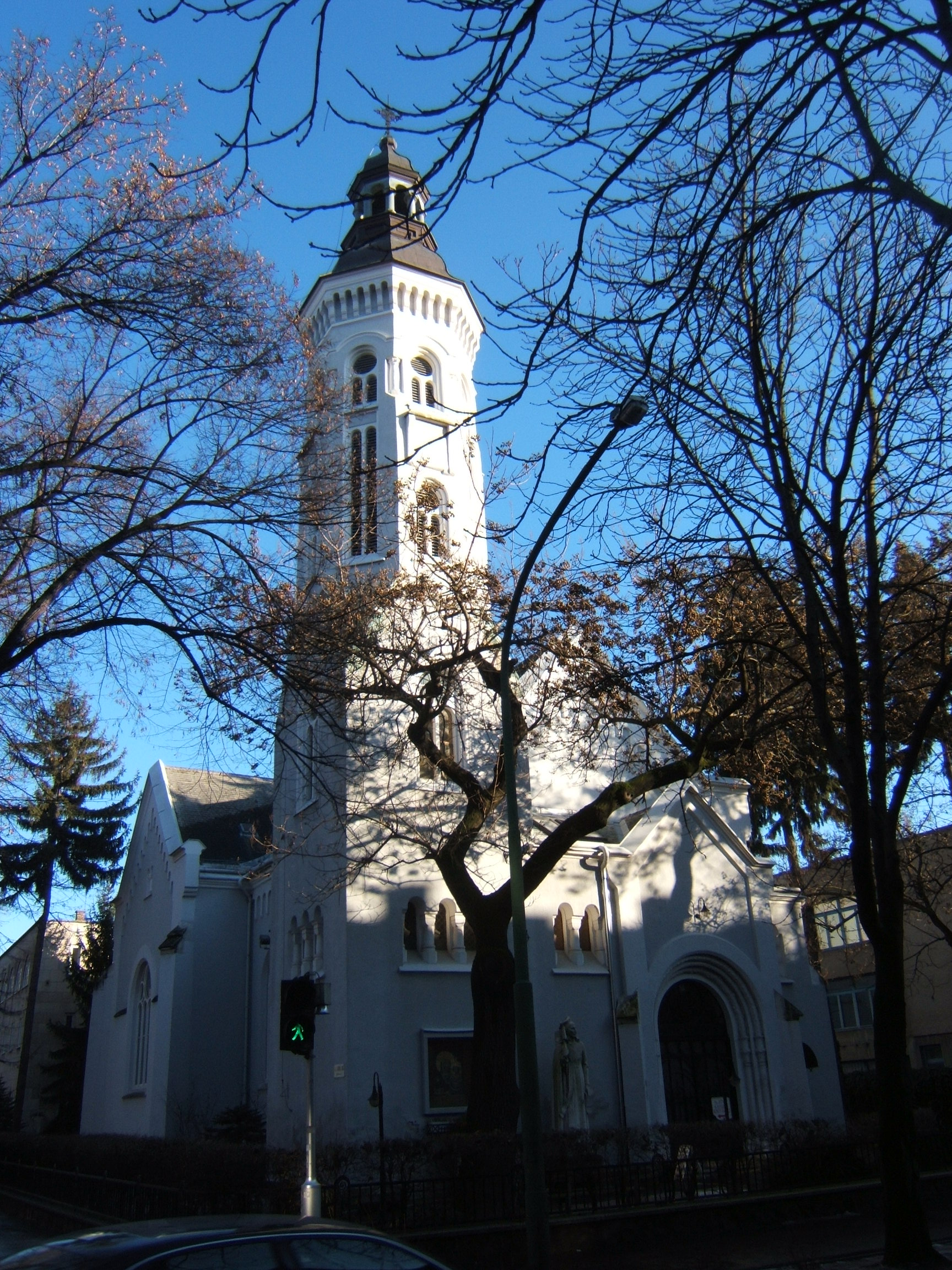 Kaposvár, Szent Imre-templom